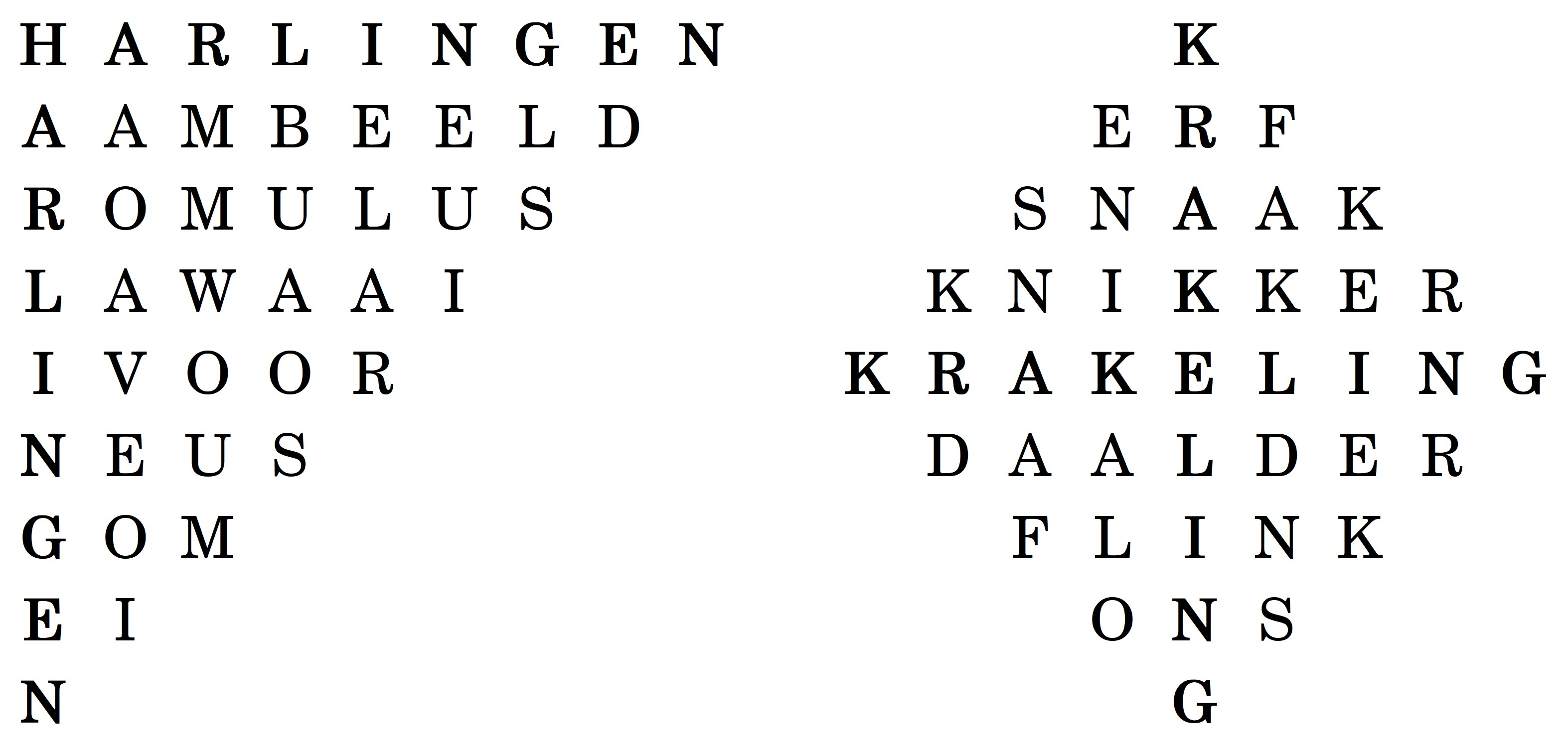 Deze 'kruispuzzels' gebruiken het principe van de acrostichon.